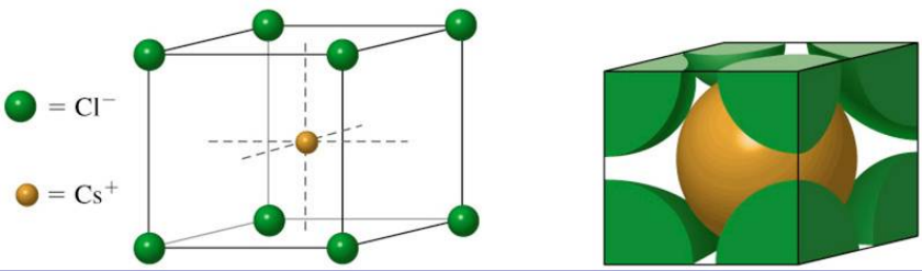 Zesio kloruro